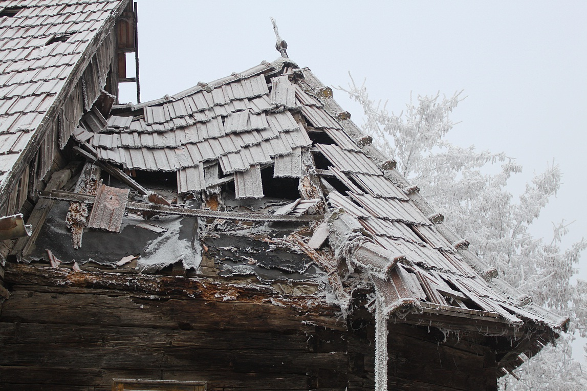 Biserica de lemn din Hărcana, județul Cluj.